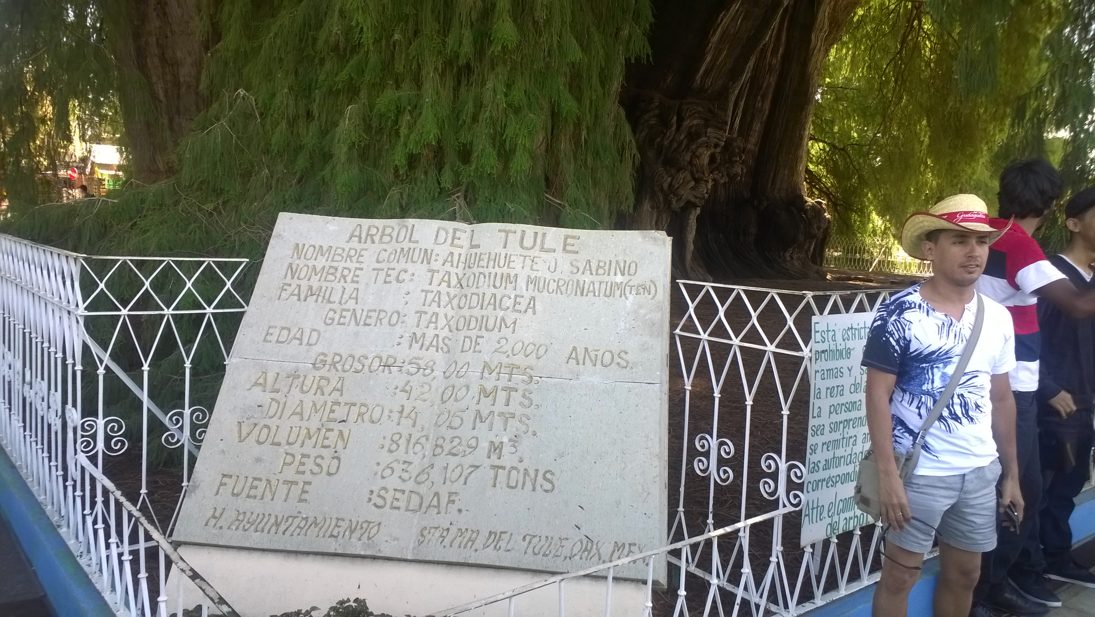 El Árbol del Tule